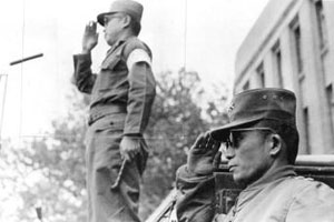 5.16 직후 중앙청 광장에 선 장도영과 박정희